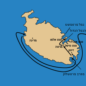 המצור הגדול על מלטה